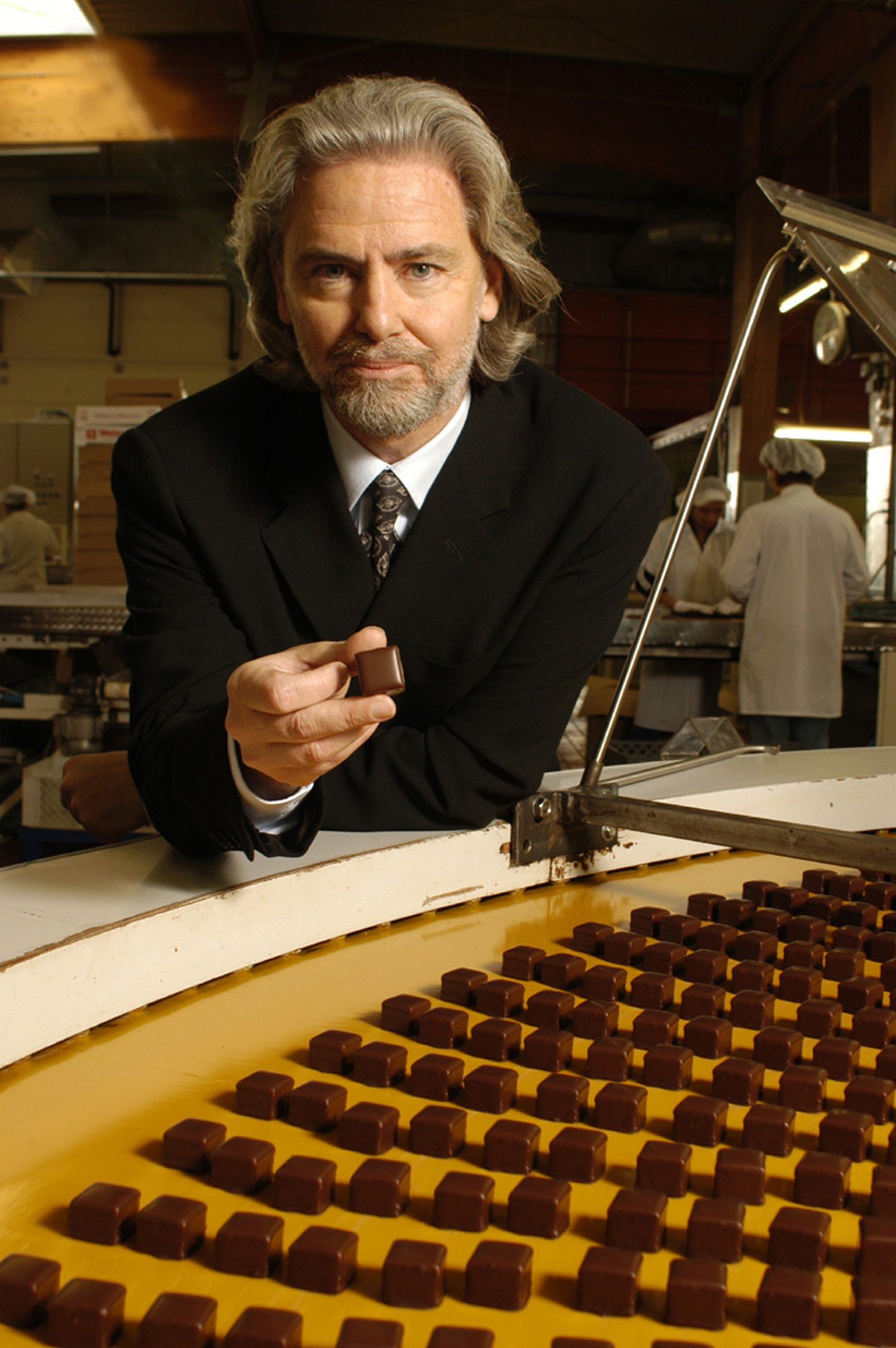 Lambertz-Inhaber Dr. Hermann Bühlbecker, an der Produktionsstraße für Dominosteine in der Aachener Printen Und Schokoladenfabrik Henry Lambertz GmbH & Co